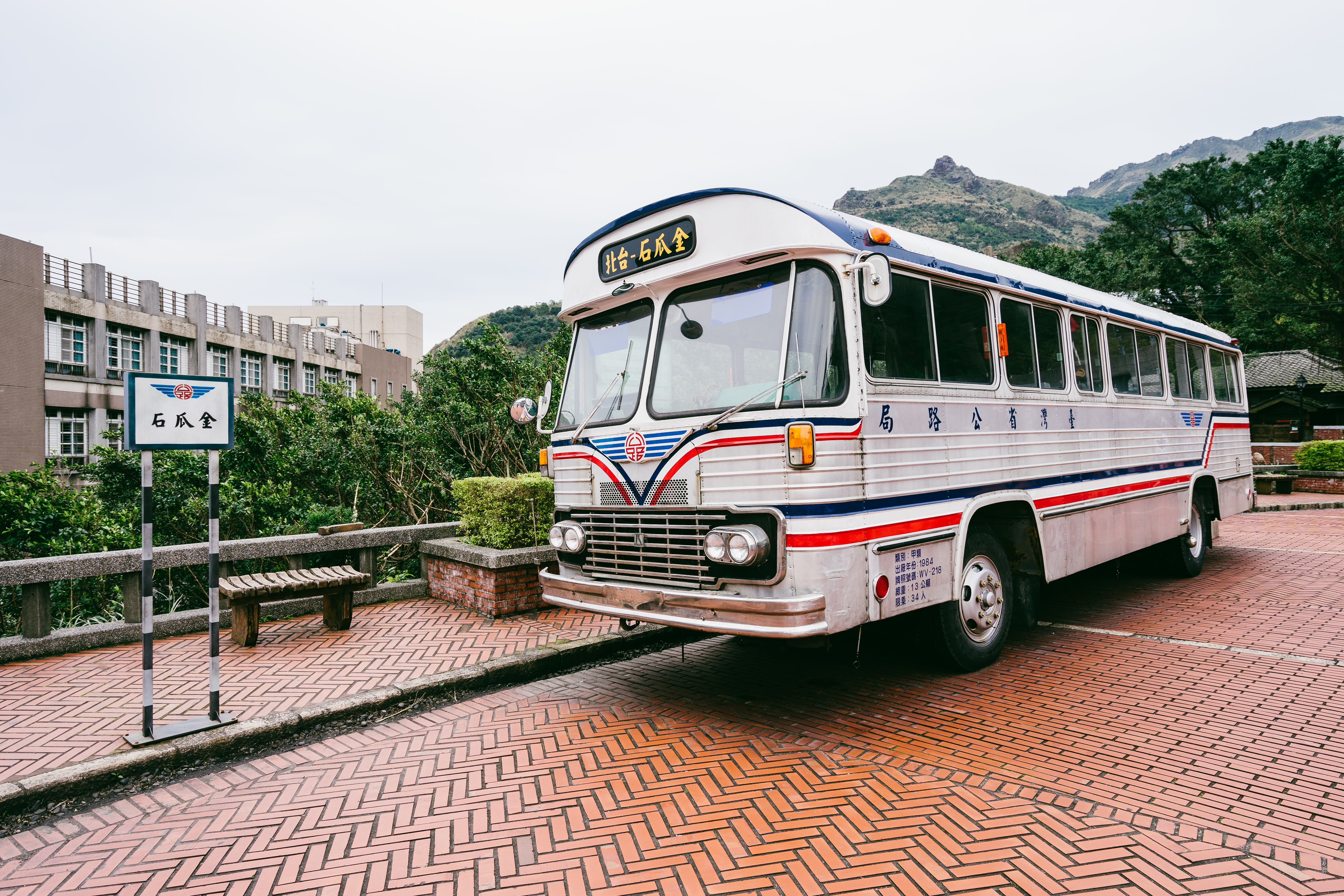 新北市立黃金博物館園區，仿臺灣汽車客運公司普通車塗裝的1984年日野大客車WV-218，以原交通部公路總局公路人員訓練所南部訓練中心（公路局南訓中心）教練車改裝（改裝前照片在此），車頭懸掛臺灣省公路局標誌與國瑞汽車標誌。車頭標示出廠年份為1984年，但臺灣省公路局已於1980年10月1日將公路客運業務獨立為臺灣汽車客運公司。